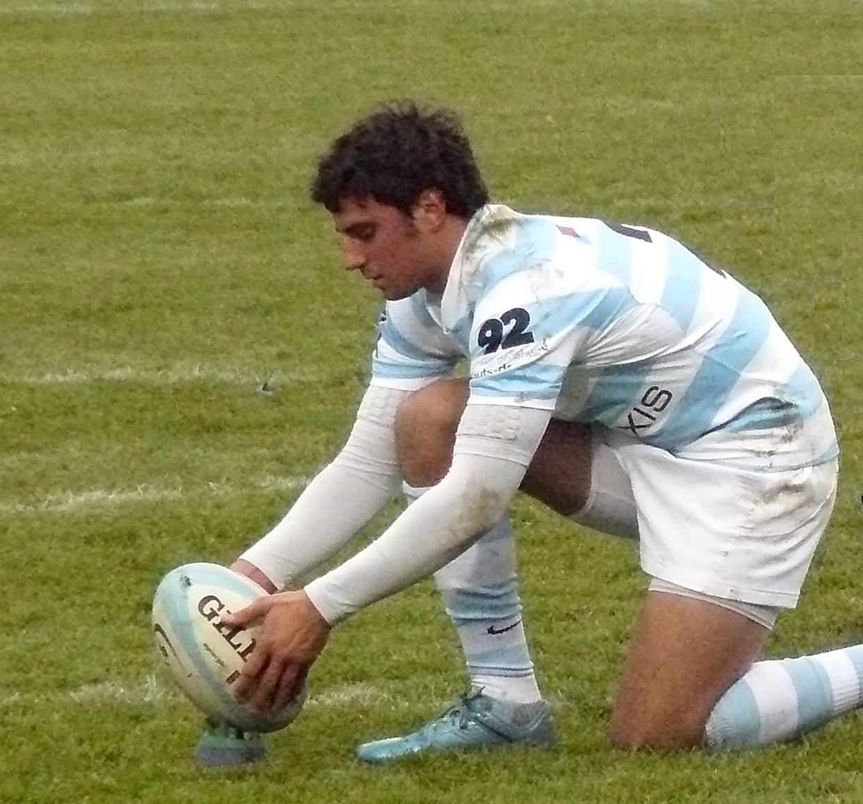 Jonathan Wisniewski, demi d'ouverture au Racing Métro 92, lors du match contre le CS Bourgoin-Jallieu, le 3 janvier 2010 à Colombes.